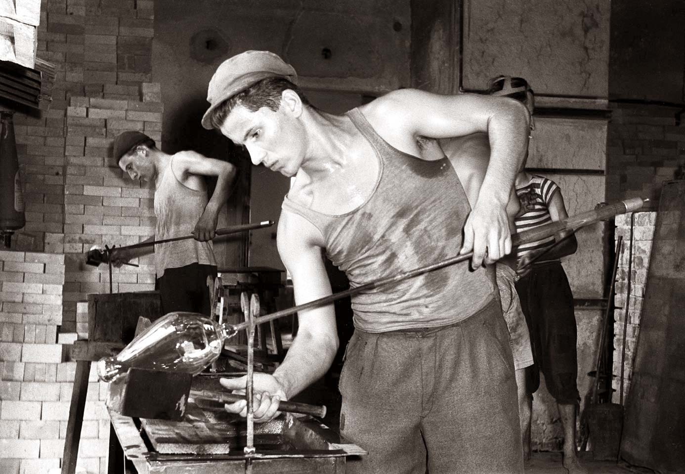 Paviljon kolektiva Tovarne steklenih izdelkov v Slovenski Bistrici